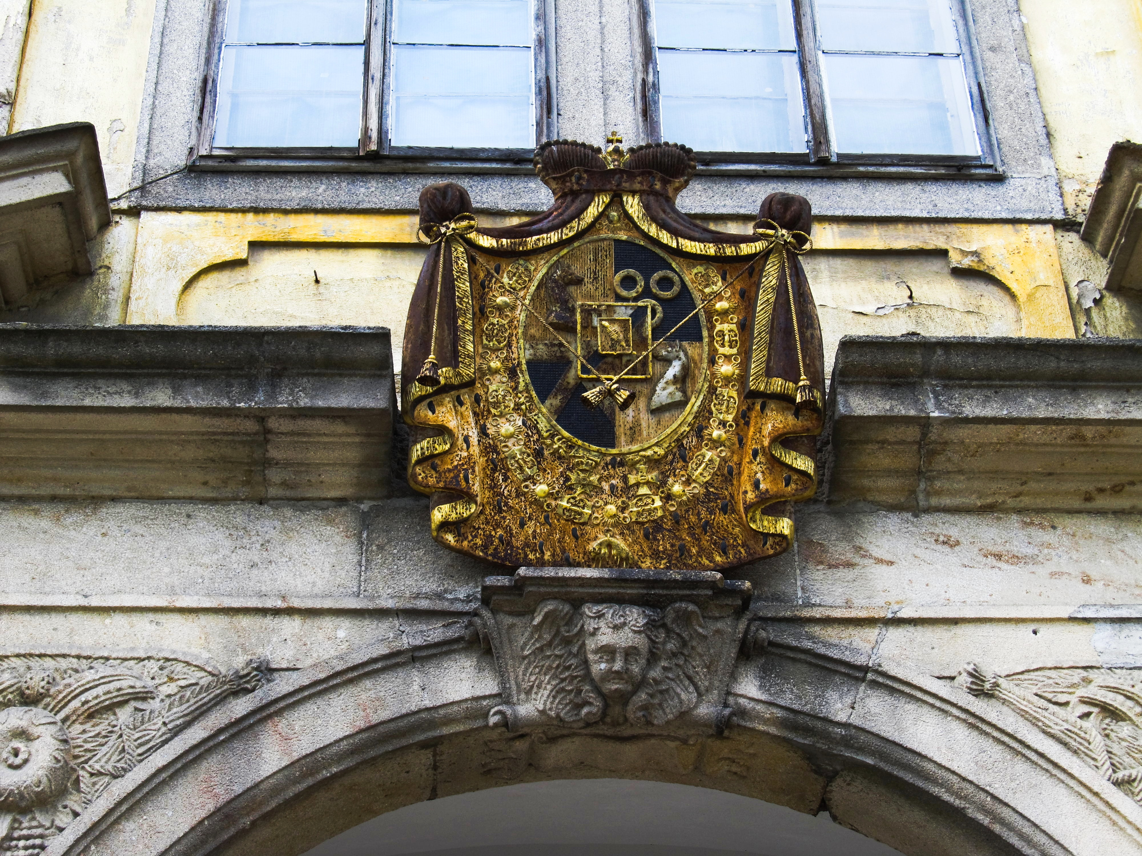 Knížecí erb Windischgrätzů nad hlavním vchodem do kláštera Kladruby